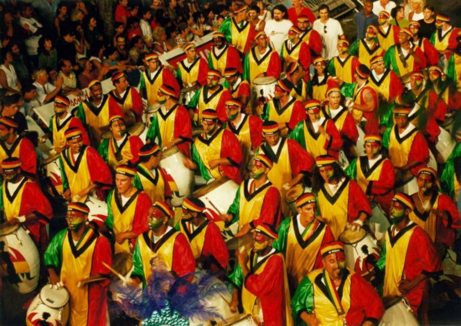 Desfile de Llamadas - Uruguay